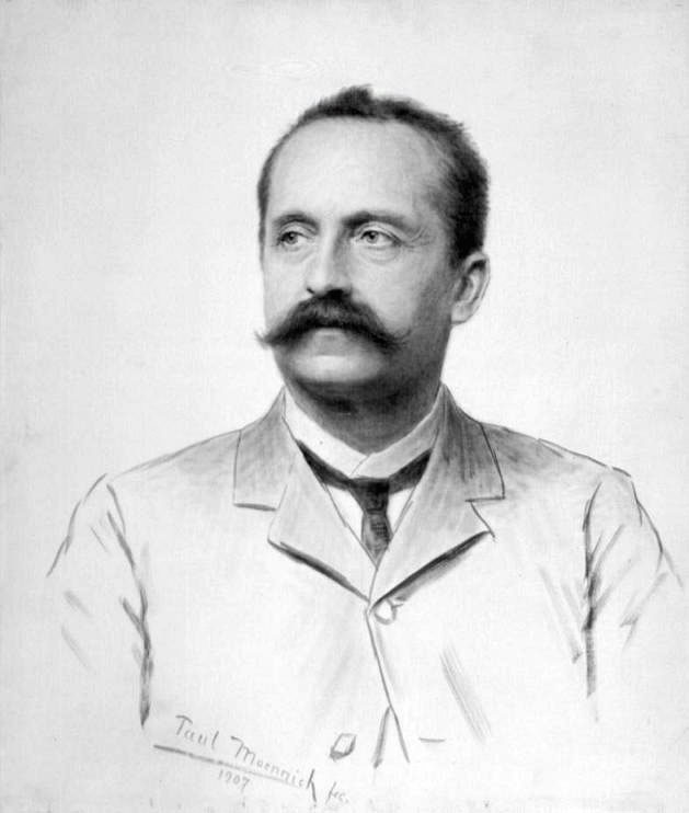 Bernhard Matthiaß (1855–1918), Ölzeichung von Paul Moennich